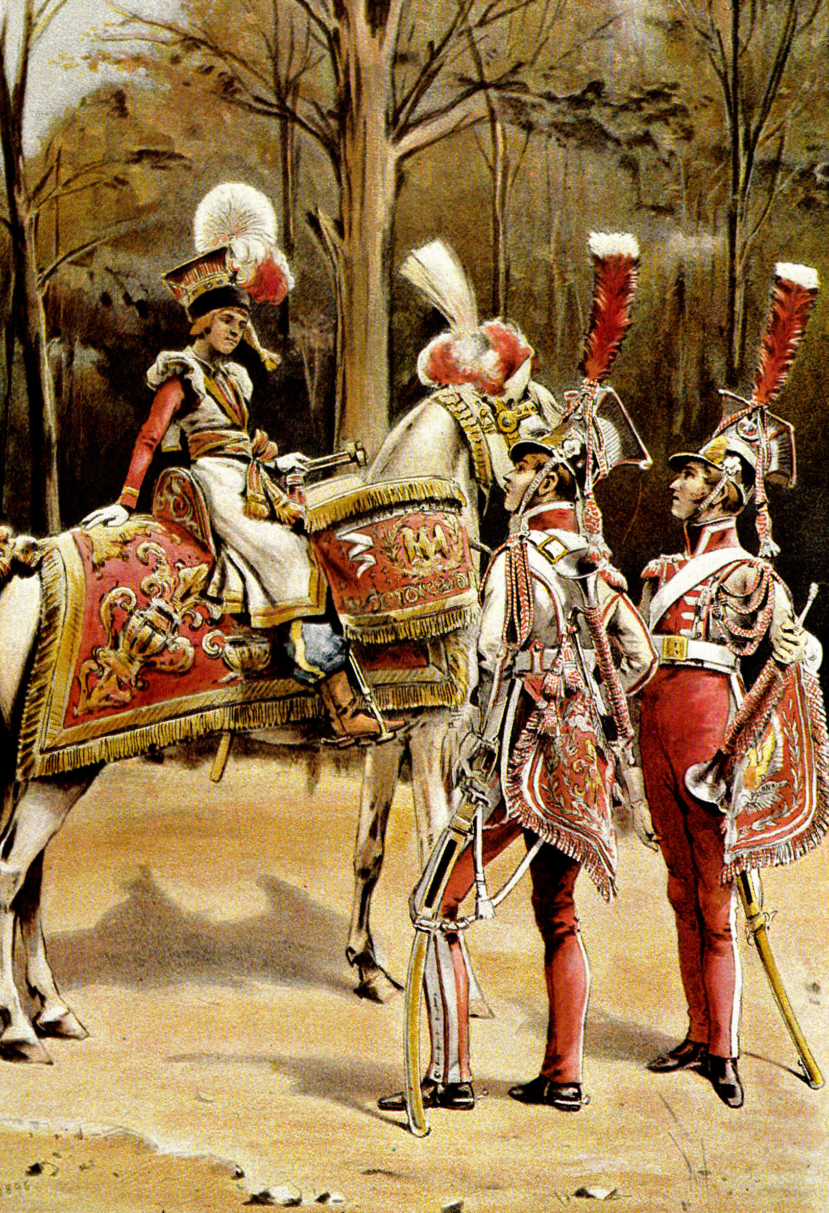 Timbalier et trompettes du régiment des chevau-légers lanciers polonais de la Garde impériale en grande tenue.